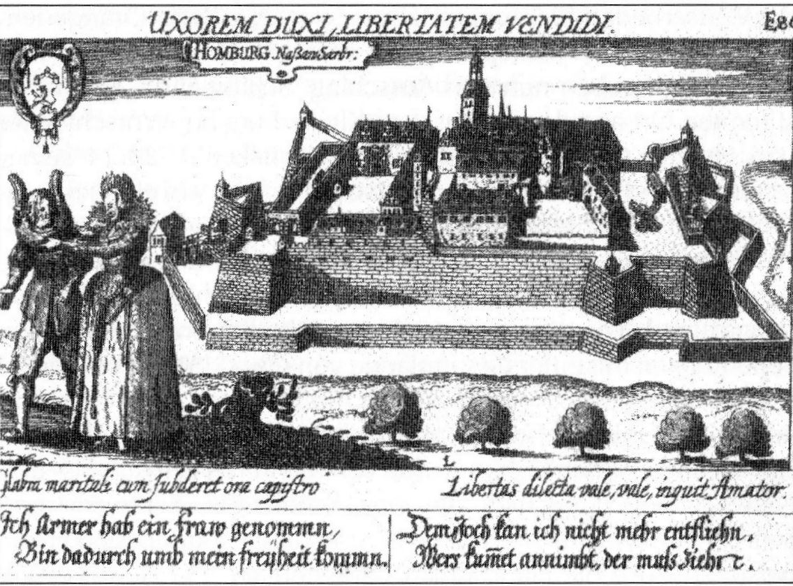 Homburg, Kupferstich von Daniel Meisner nach den Zeichnungen Heinrich Höers, 1623 und 1630, Thesaurus philopoliticus